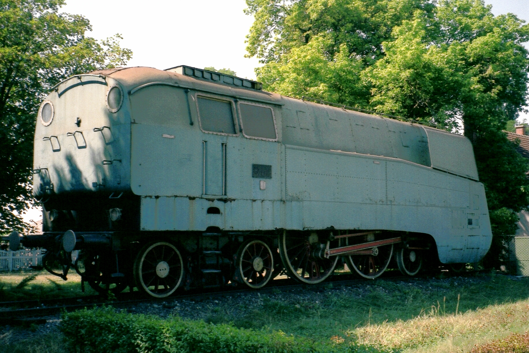 Dampflokomotive 242.001 als Denkmallok in Püspükladany 07.08.95